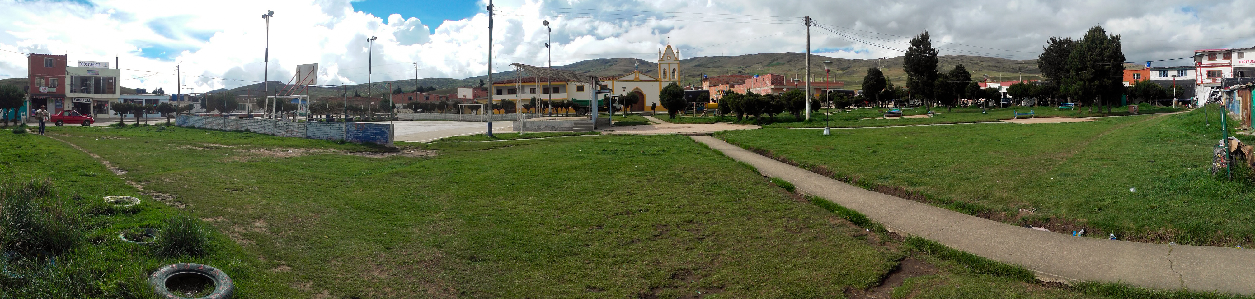 Berlín, Santander Col Panorámica